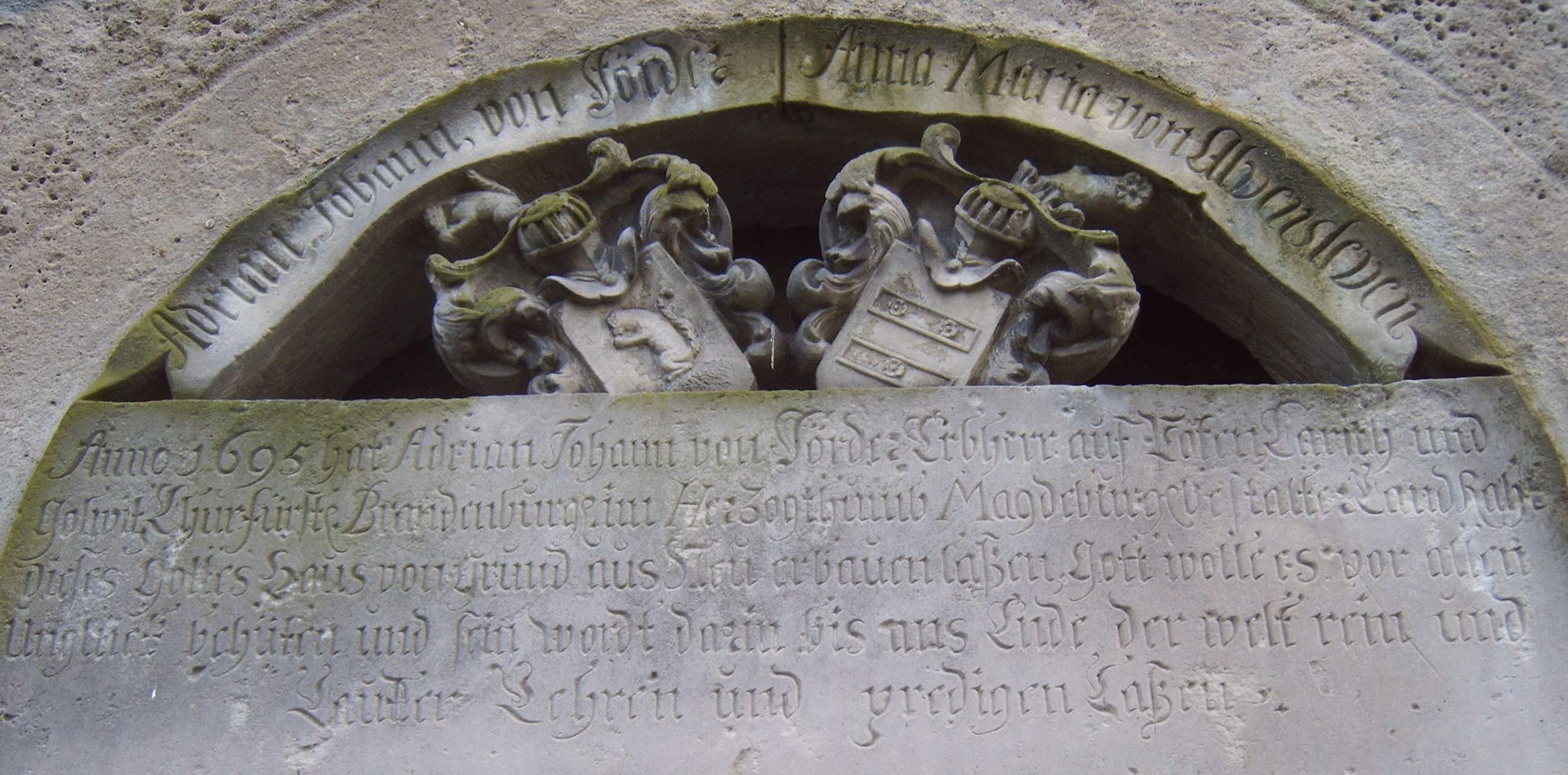 Ruine der Gutskapelle Pöthen, Inschrift Erbauung 1695, Pöthen, Gommern